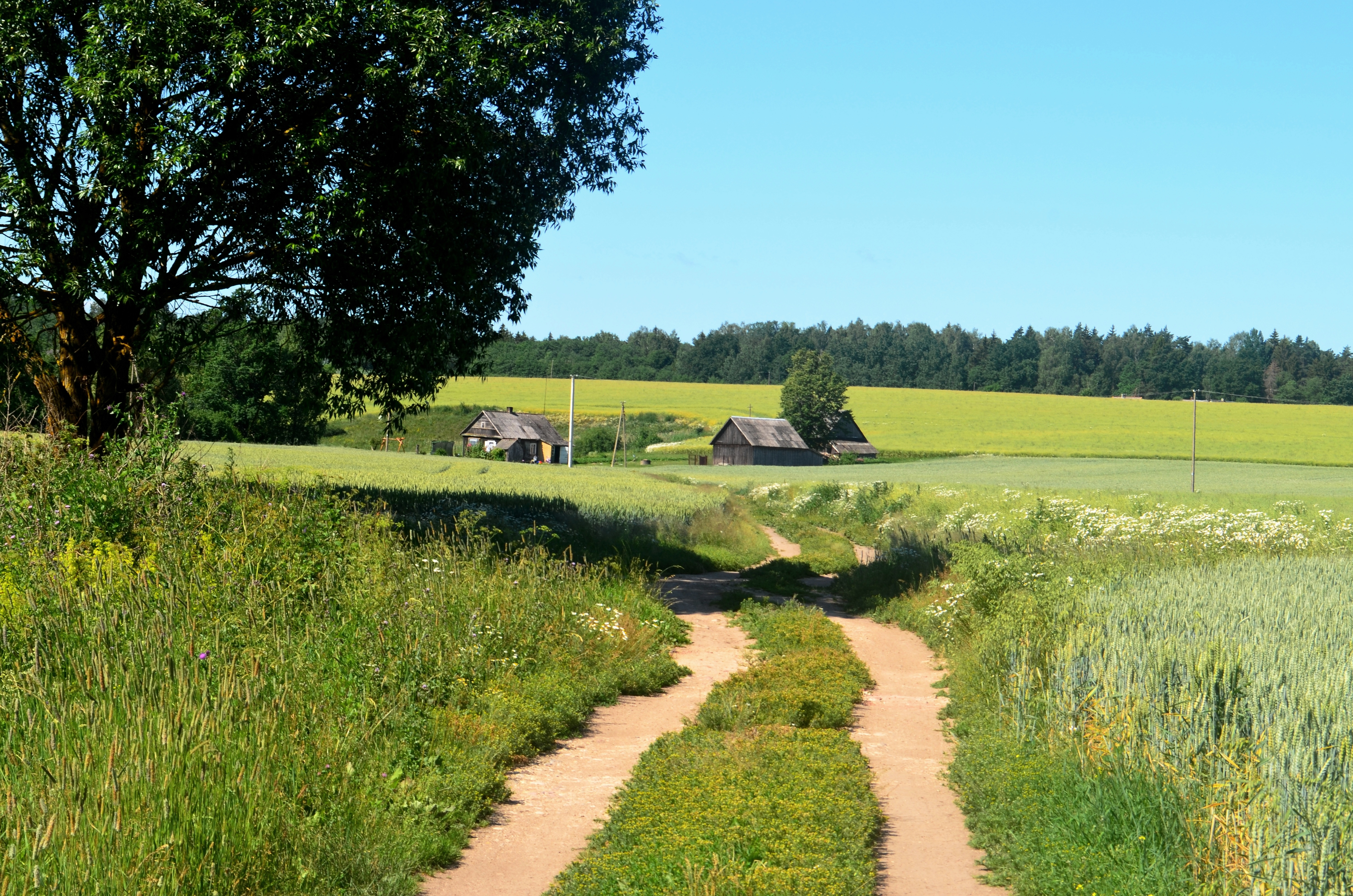 Jugintai, Kauno raj.